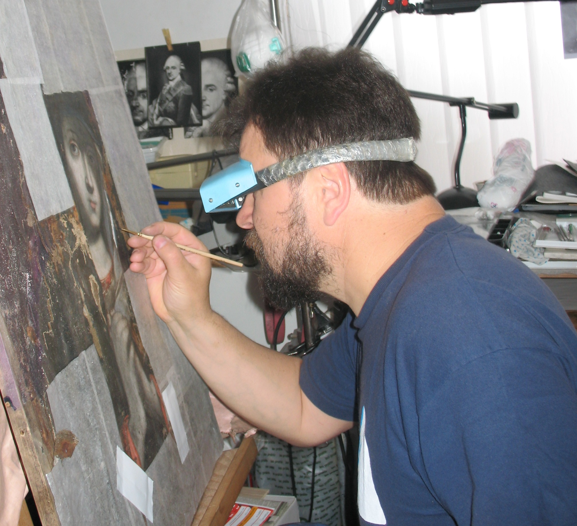 Художник-реставратор Анатолій Квасюк